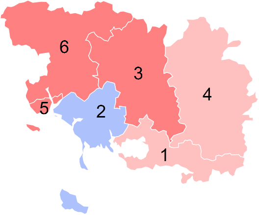 Résultats des élections législatives du Morbihan en 2012